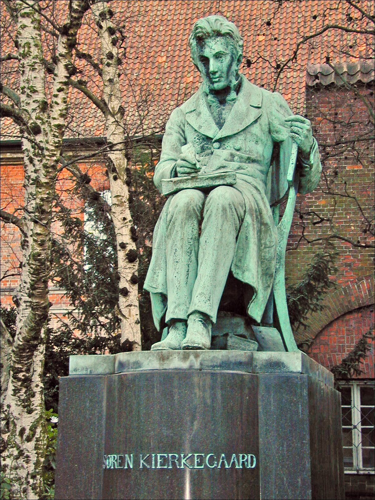 The Søren Kirkegaard statue in the Royal Library Garden og Slotsholmen in Copenhagen, Denmark